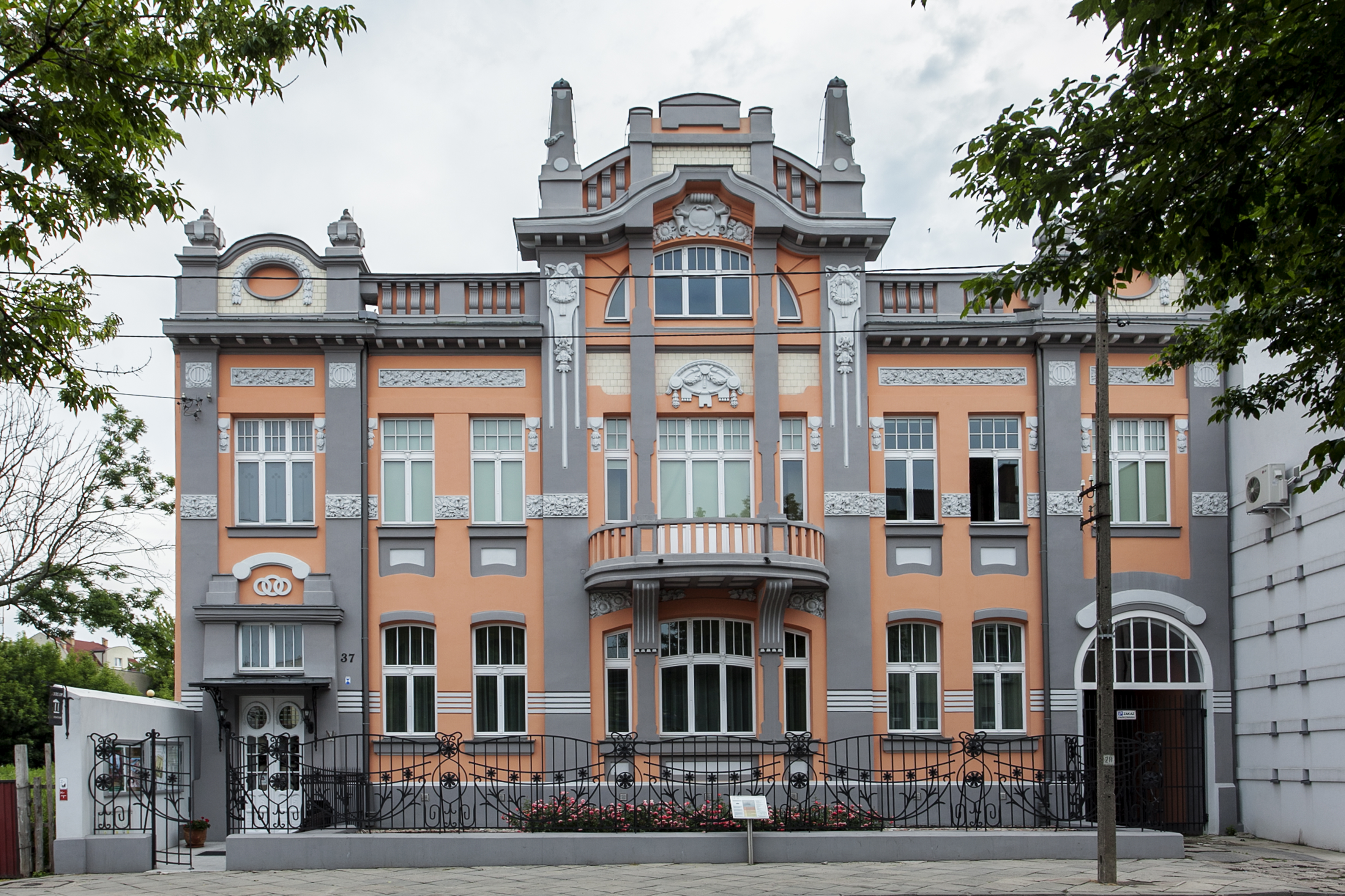 Fasada tzw. kamienicy Cytronów (Lurie) w Białymstoku, ob. Muzeum Historyczne